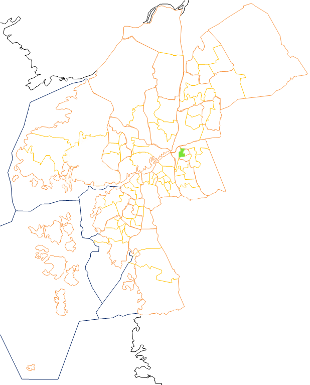 Karta som visar primärområdes belägenhet i Göteborg